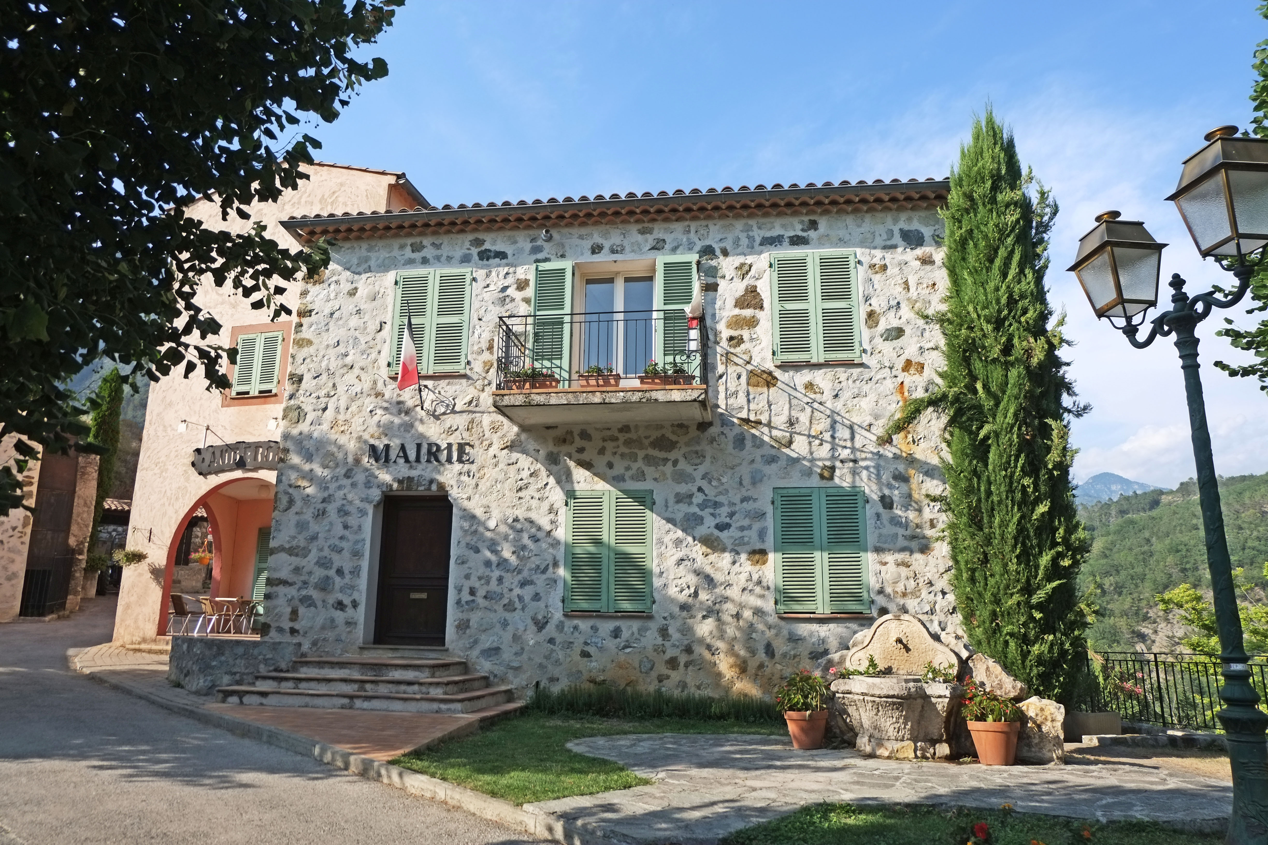 La mairie de Massoins.